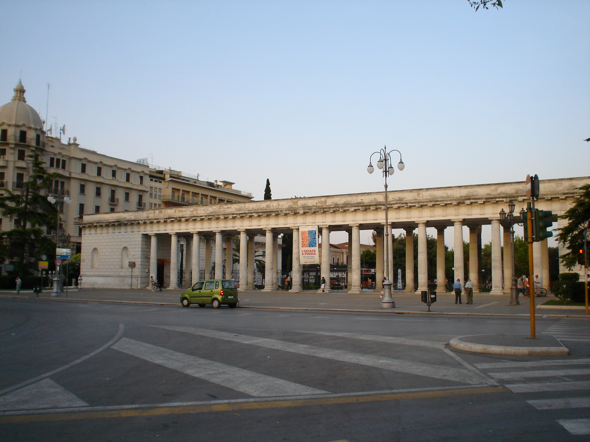 قصر البلدية.